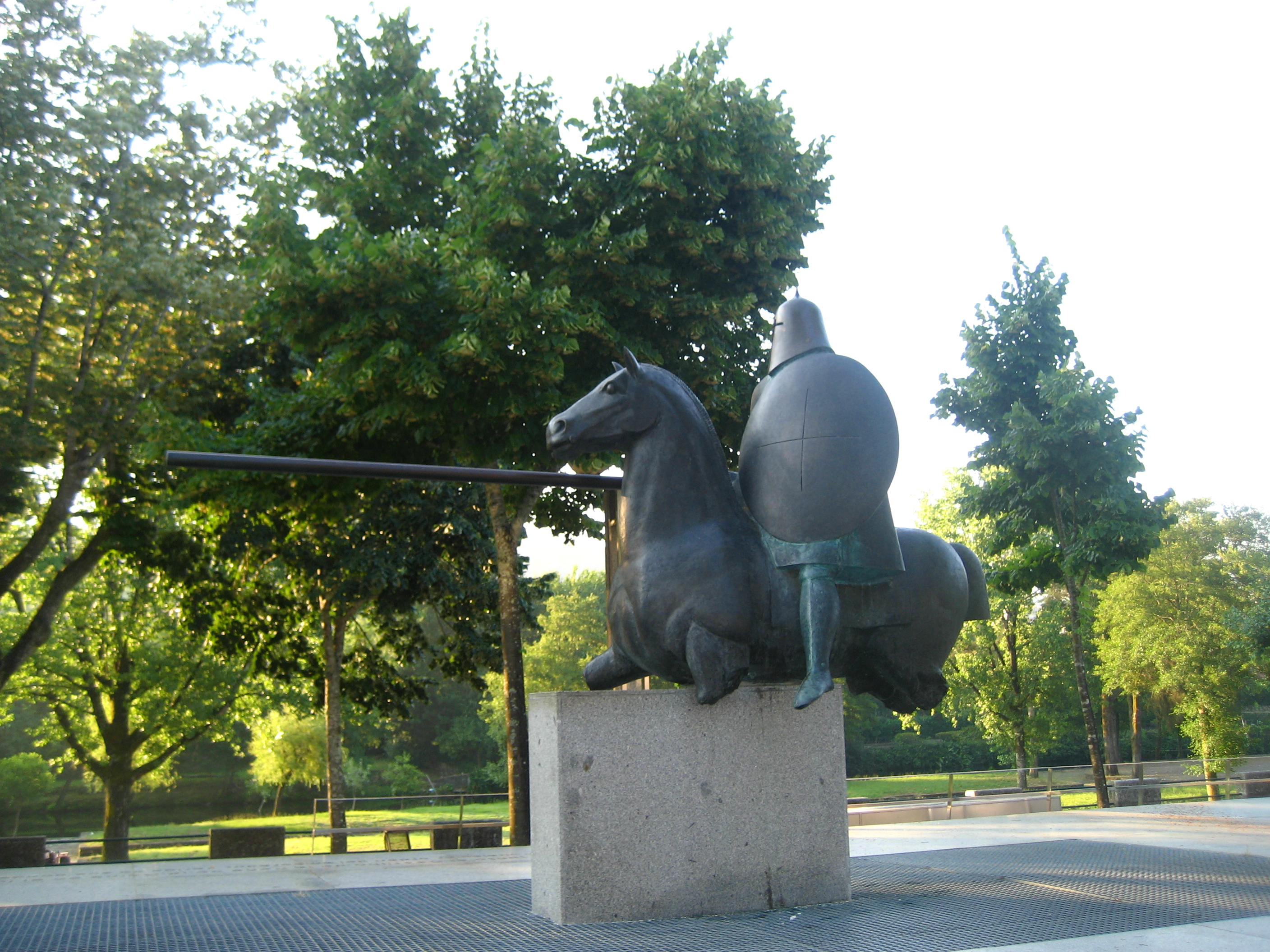 Statues de la bataille de Valdevez, Arcos de Valdevez, Portugal